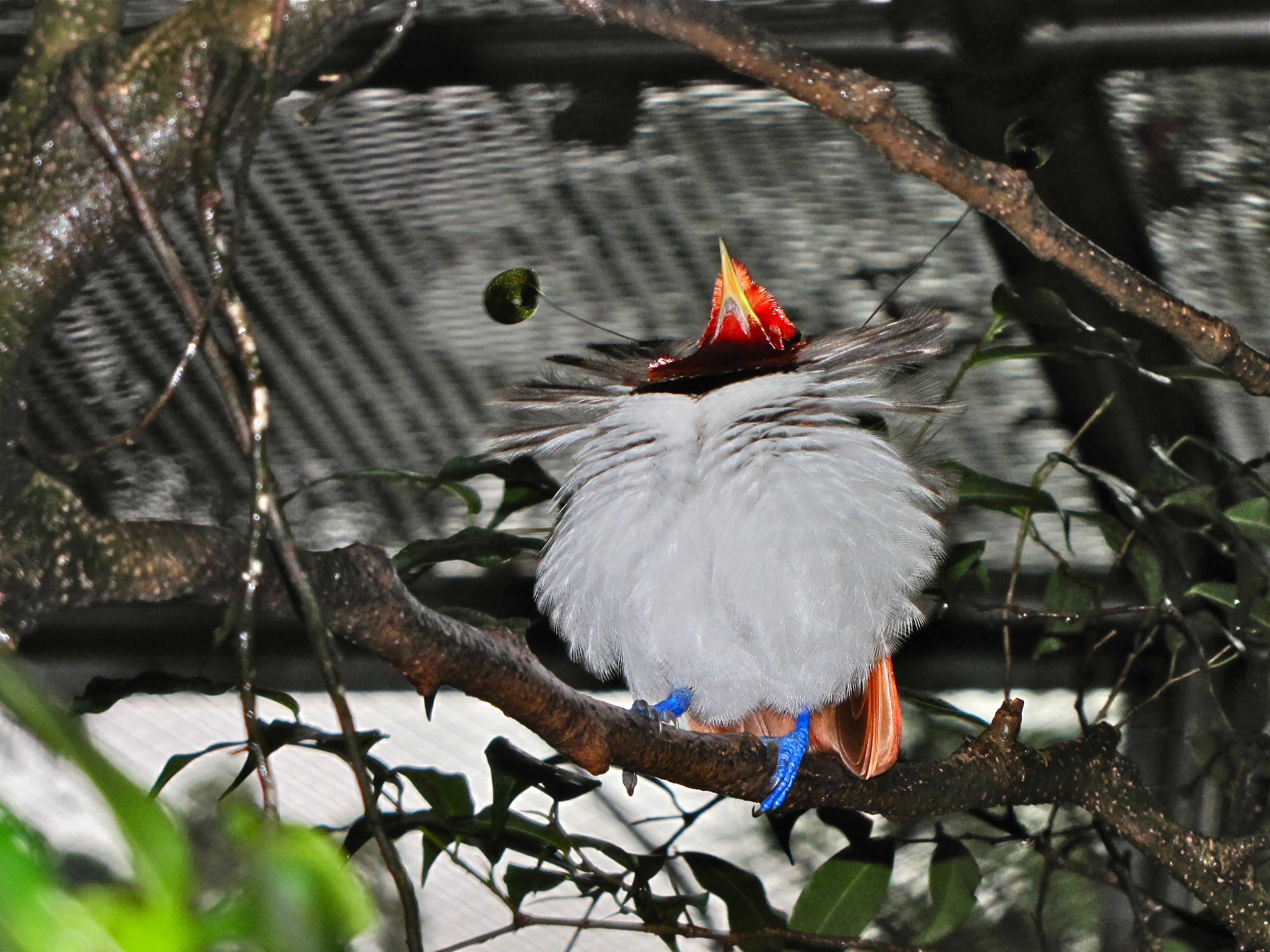 Bird Park Kuala Lumpur